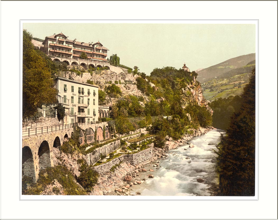 Meran Gilf-Anlagen and Zenoberg (i.e. Zenoburg) Tyrol Austro-Hungary